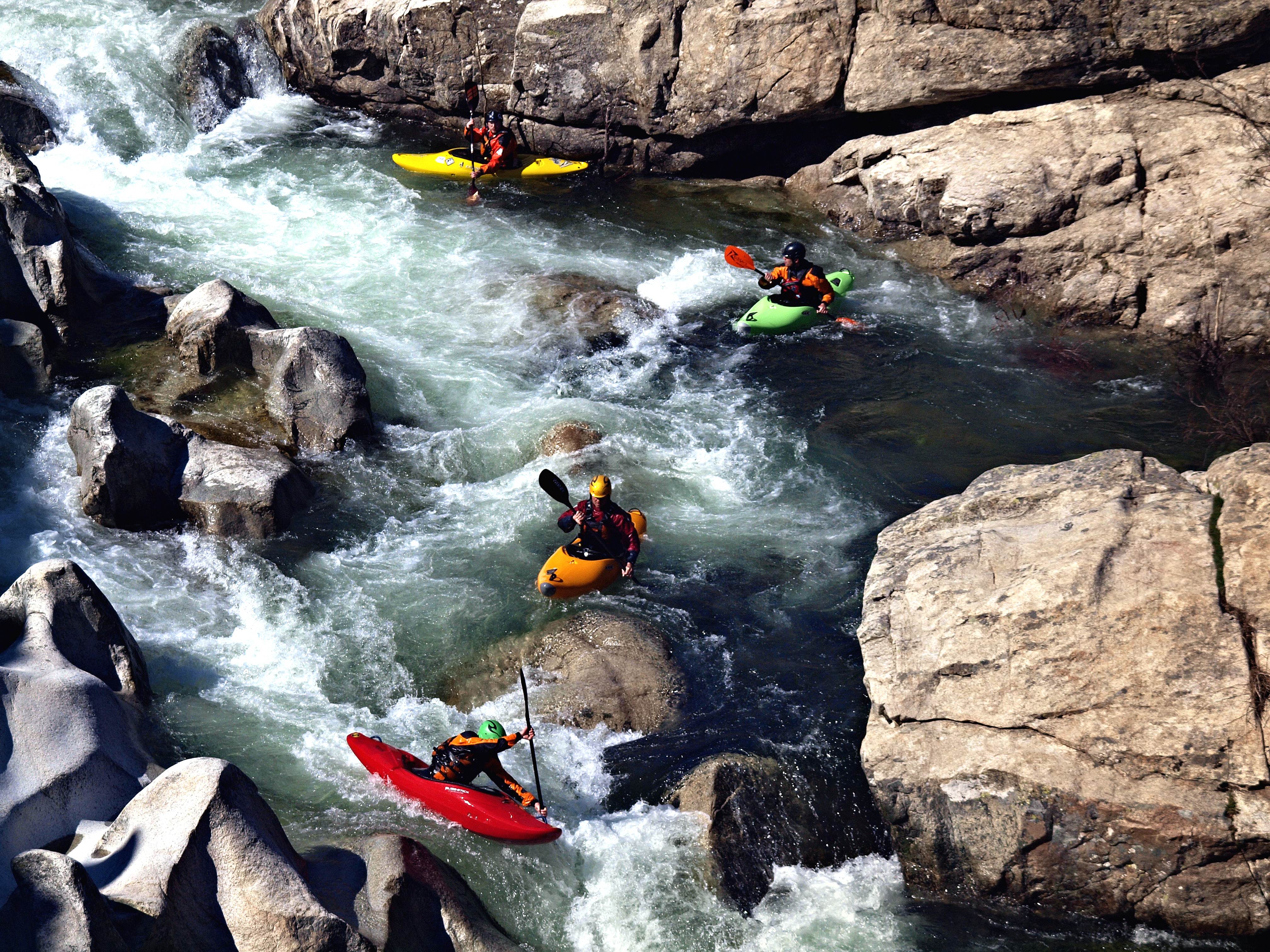 Albertacce, Niolu (Corse) - Kayakistes en amont du Ponte Altu, pont génois sur le Golo